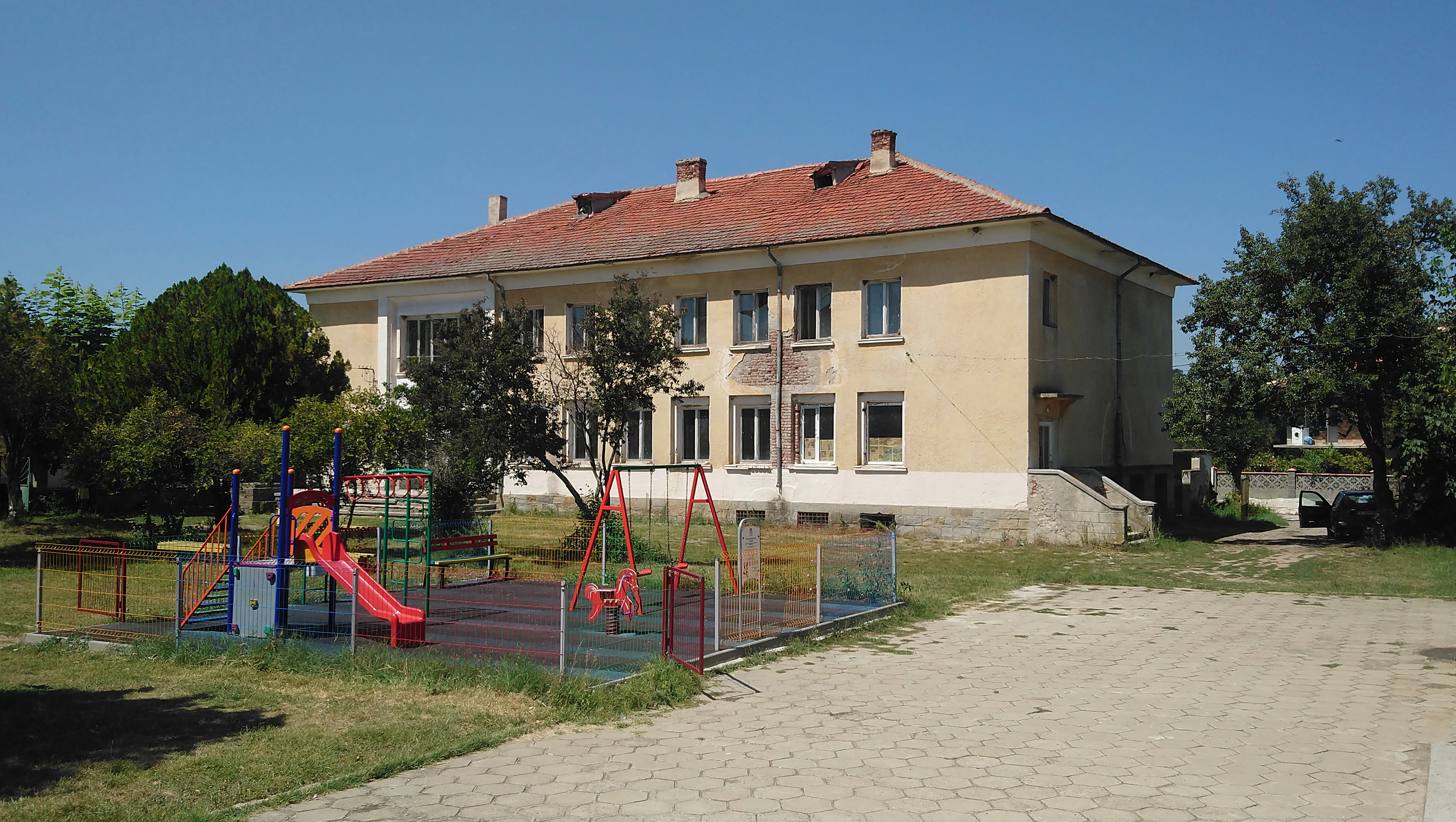 Вресово - детската площадка